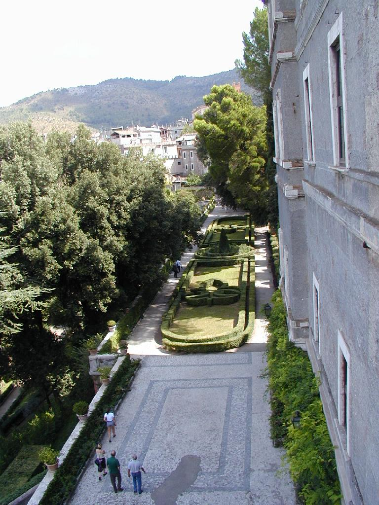 Tivoli, Villa d'Este: il Vialone sotto il palazzo